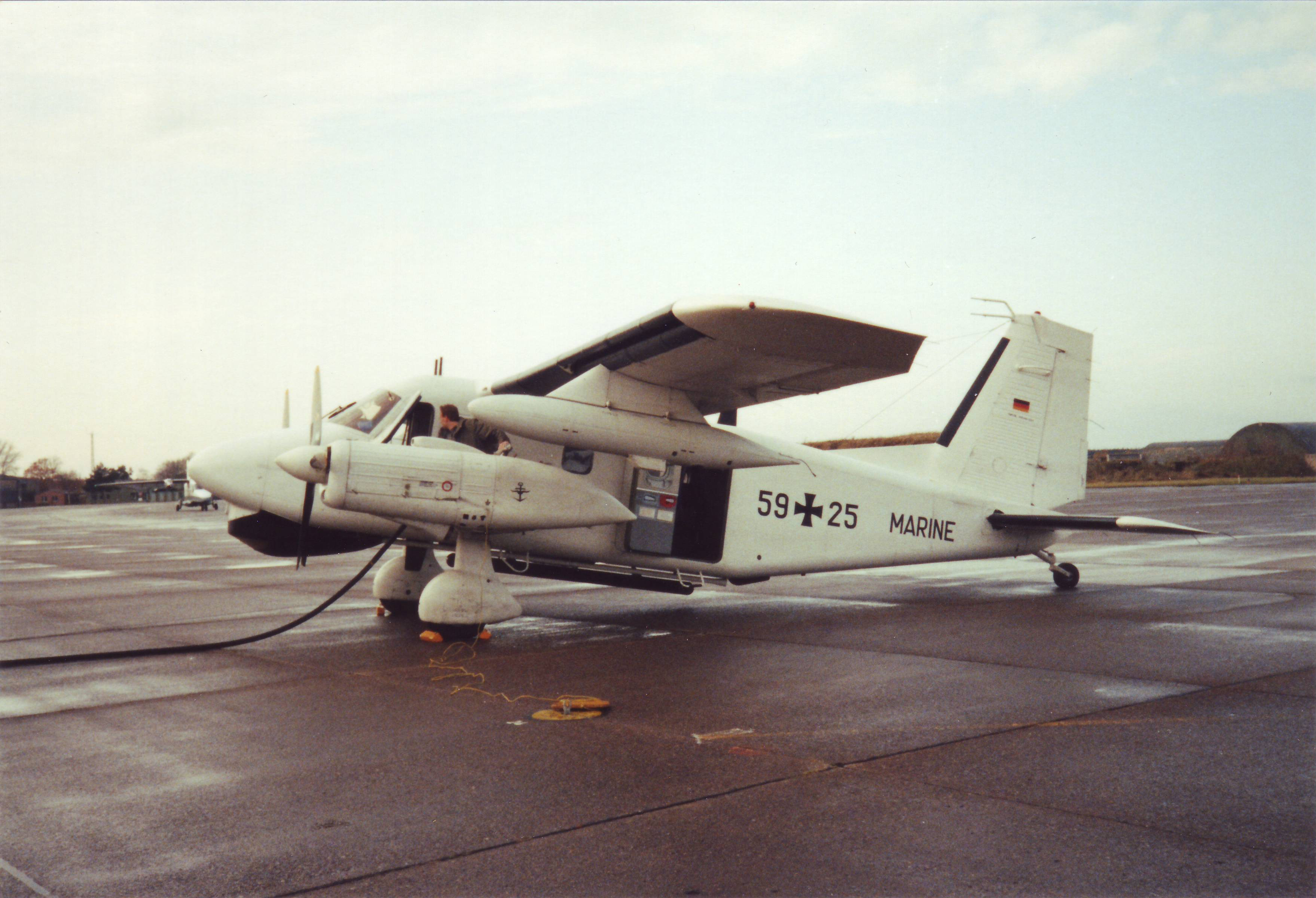 Oelüberwachungsflugzeug Dornier Do 28; Scan eines Bildes aus dem Jahr 1993